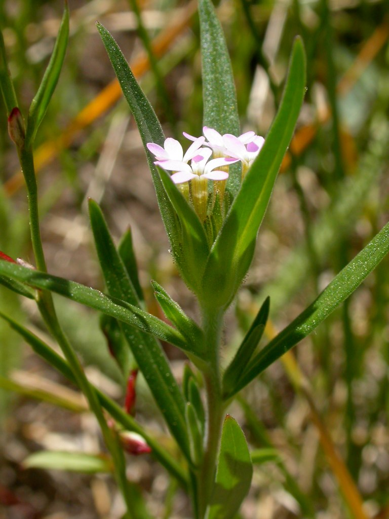 Collomia linearis inflorescence